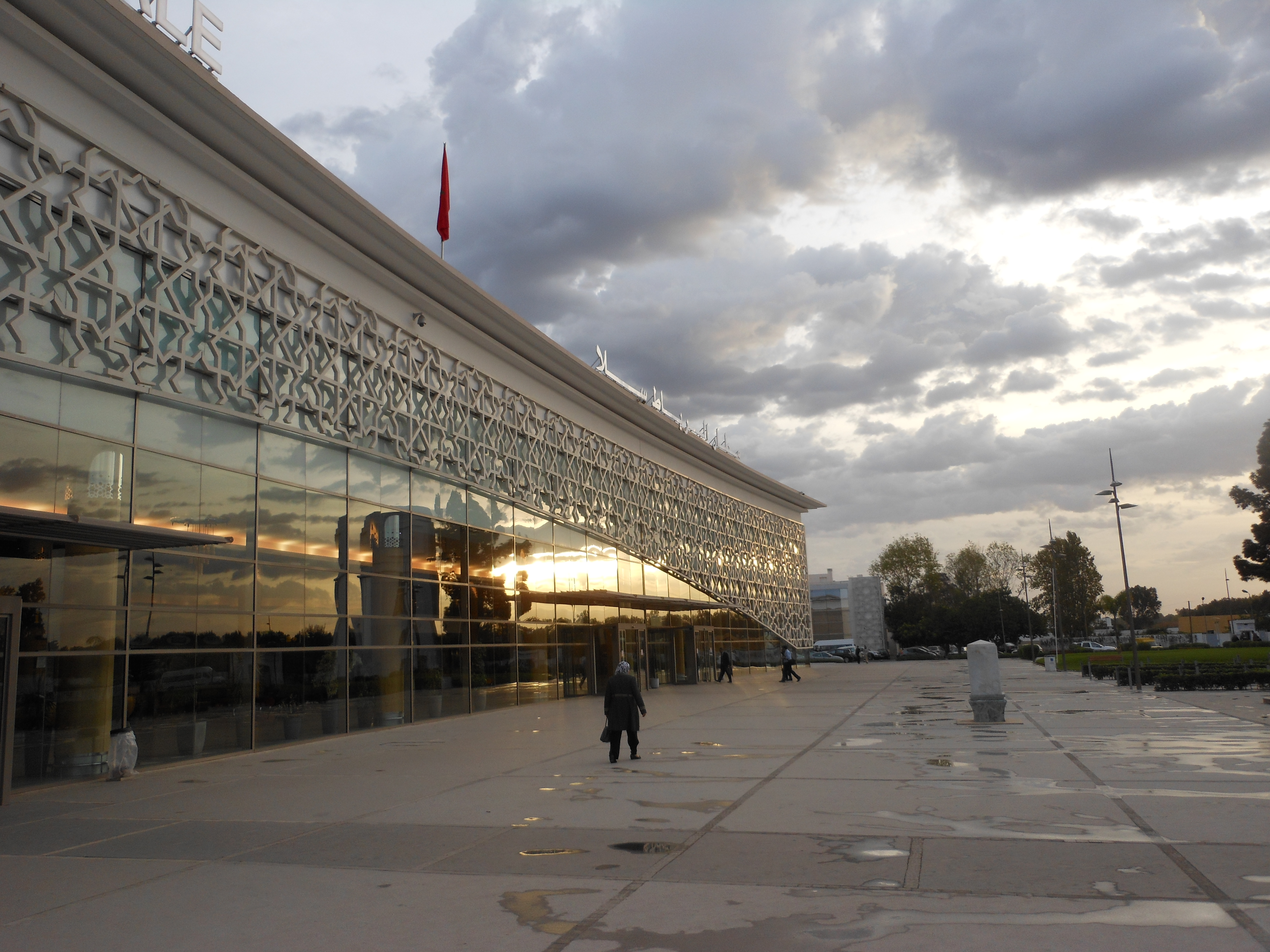 Reflets sur une façade de l'aéroport Rabat-Salé, au Maroc, peu après une nuit orageuse et le lever du soleil.